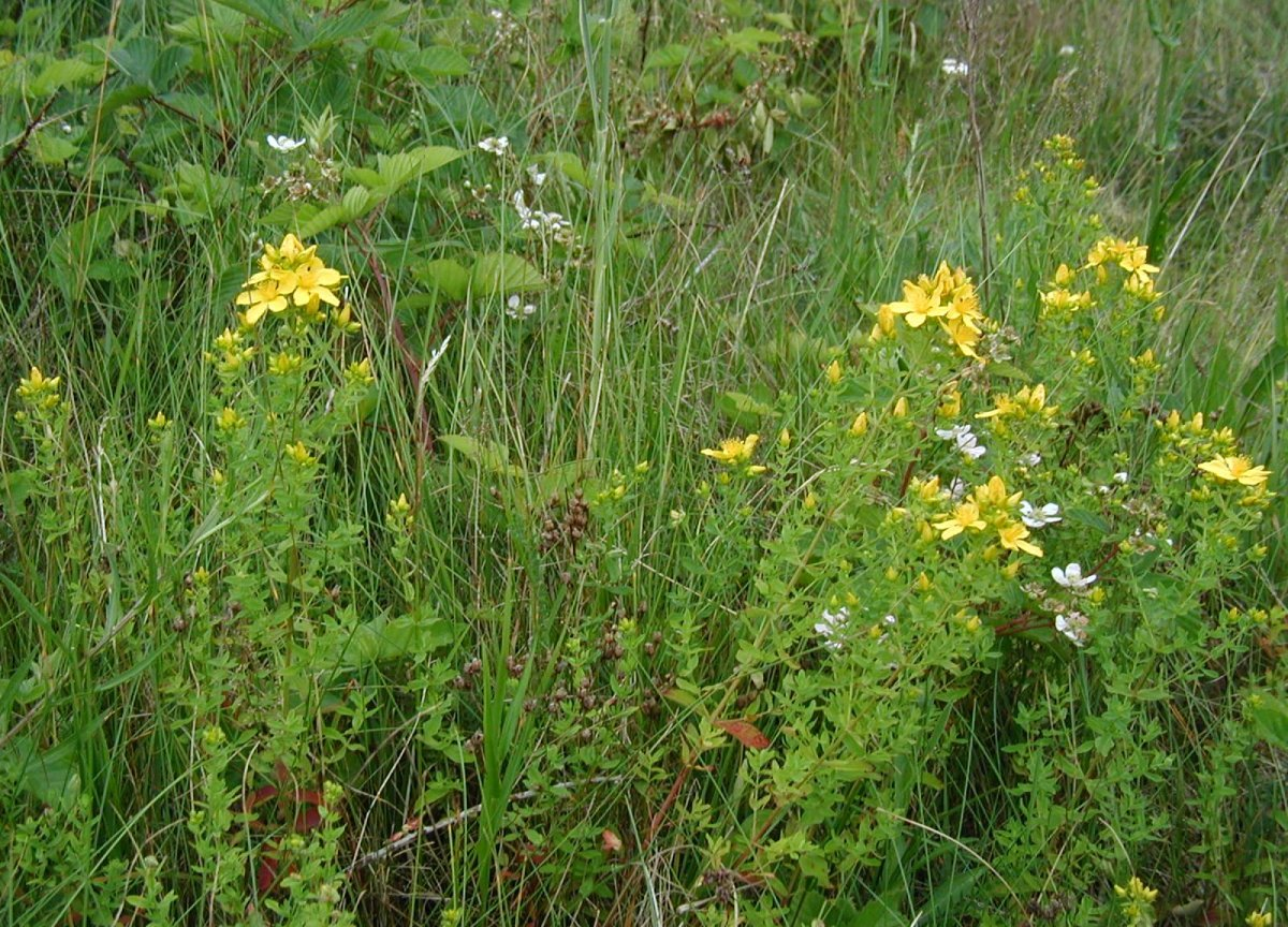 Hypericum perforatum: Habit Hypericum perforatum